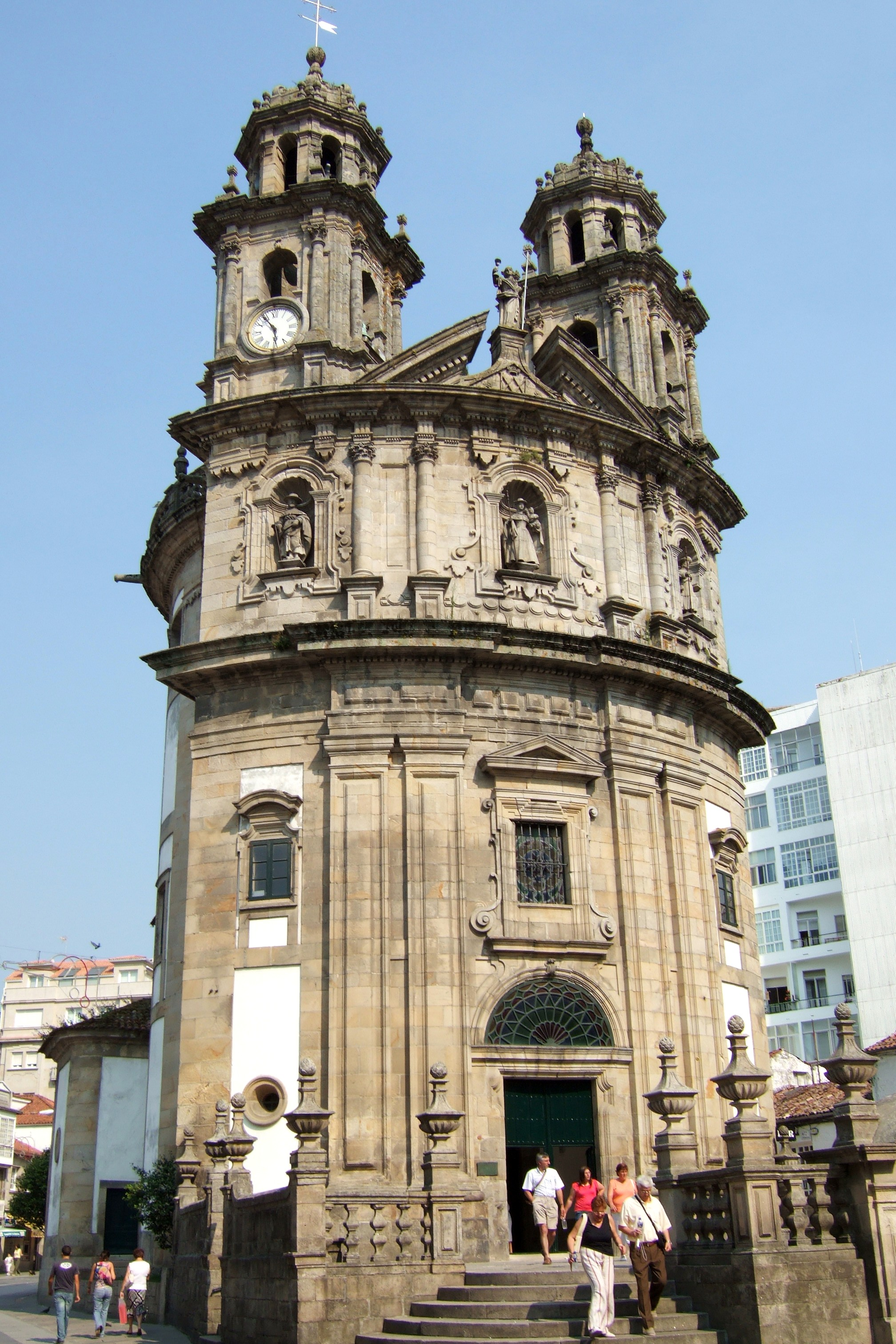 Peregrina Capela da Virxe Peregrina (Pontevedra)